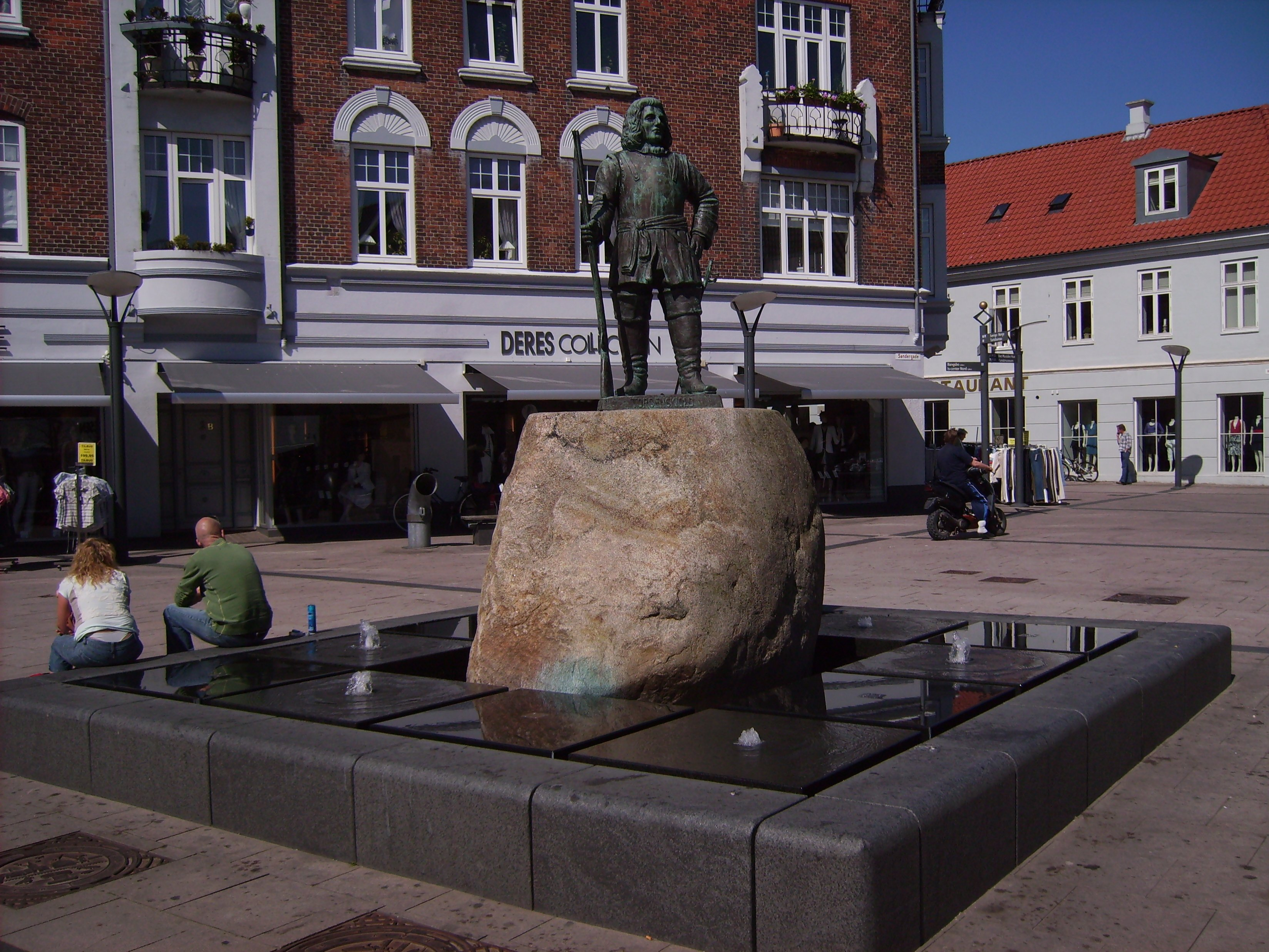 The town Frederikshavn (Fredrikshamn) in Denmark.